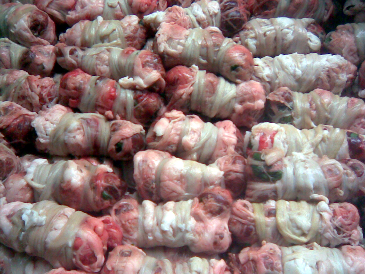 mbruiatieddhri crudi a una sagra